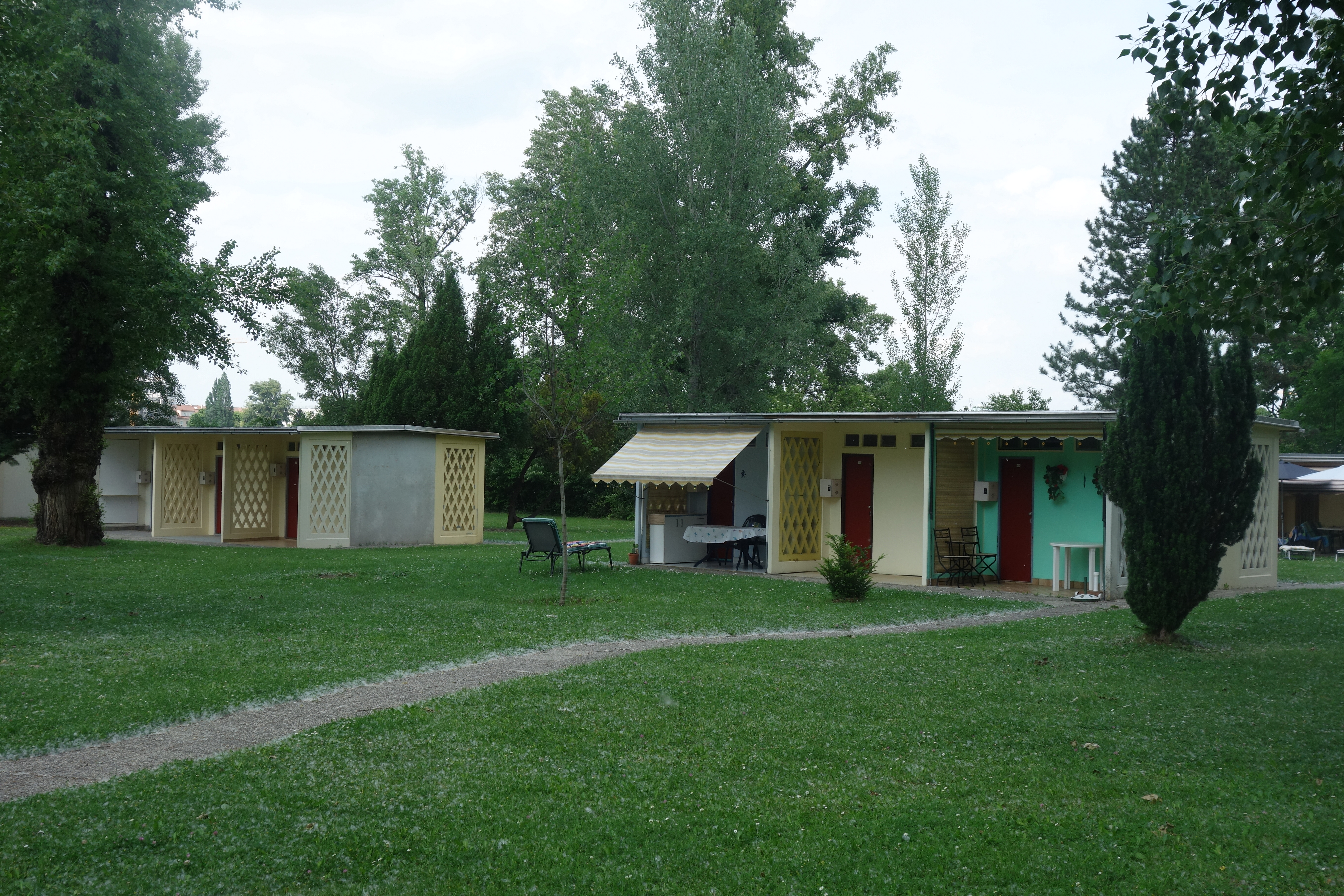 Gänsehäufel - Kabanen (Vorbaukabinen)